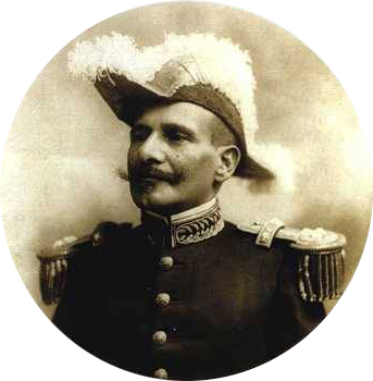 Hermes da Fonseca, oitavo presidente do Brasil (1910-1914) em traje militar, antes da presidência.